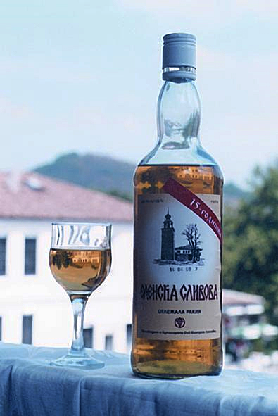 Еленска сливова ракия